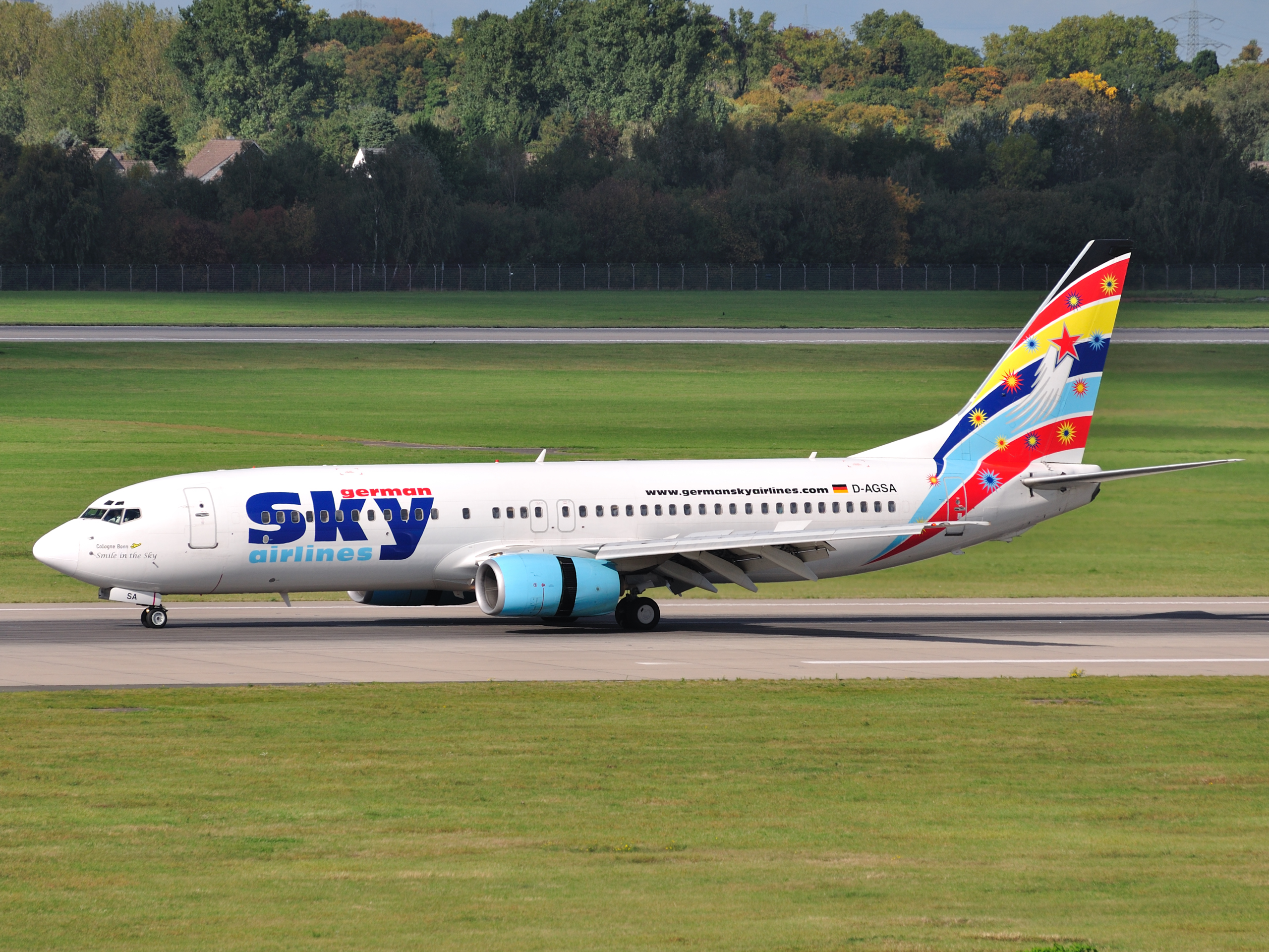 German Sky Airlines B737-800 D-AGSA